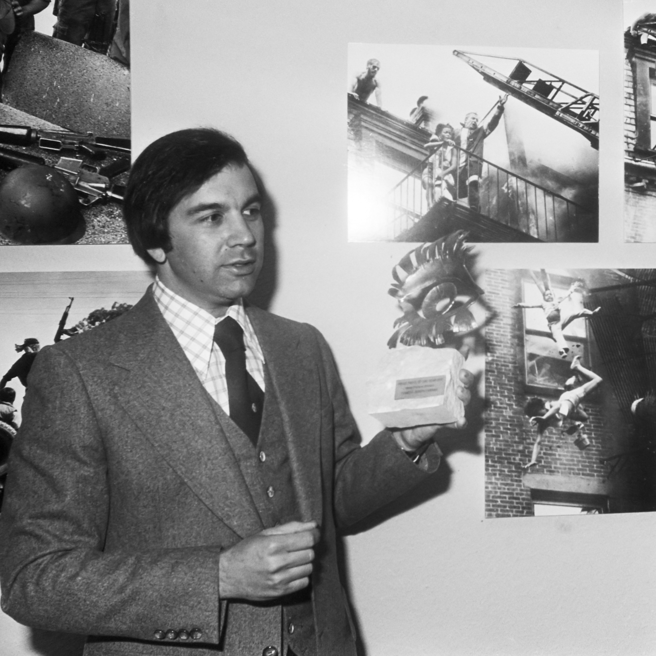 World Press Photo geopend door Van der Stoel in Van Goghmuseum in Amsterdam; Van der Stoel met winnaar Stanley Forman bij zijn fotos 14 april 1976